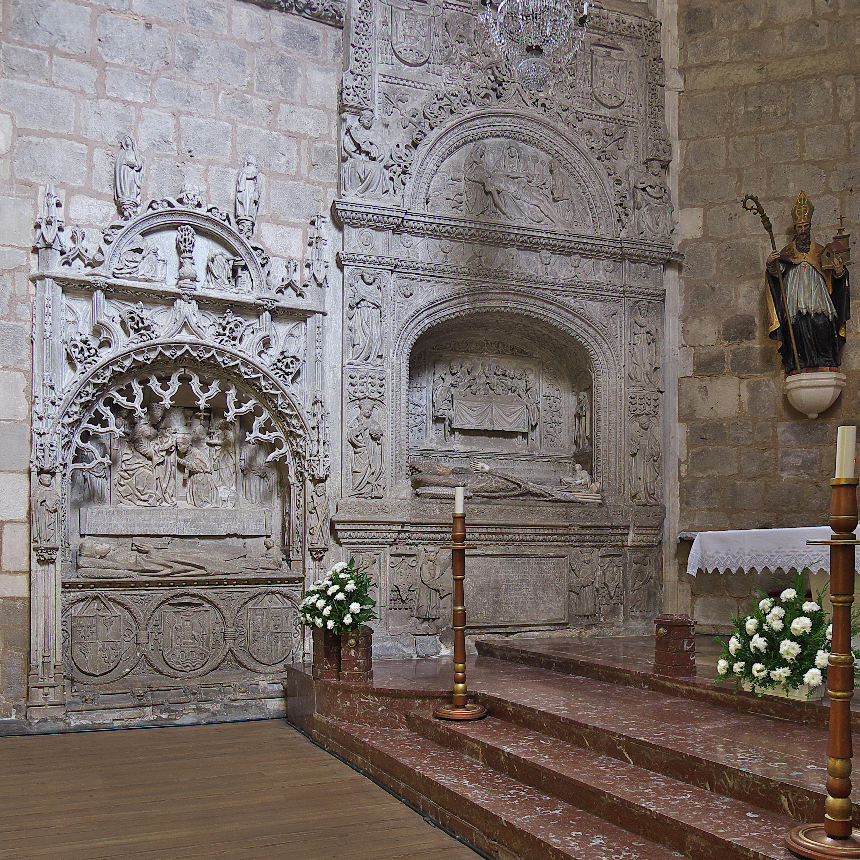 Juan de Ortega (†1515), obispo de Almería, recibe sepultura en el presbiterio del Convento de Santa Dorotea (Burgos). El sepulcro plateresco es obra de Nicolás de Vergara el Viejo (ca. 1516) esculpido en piedra.